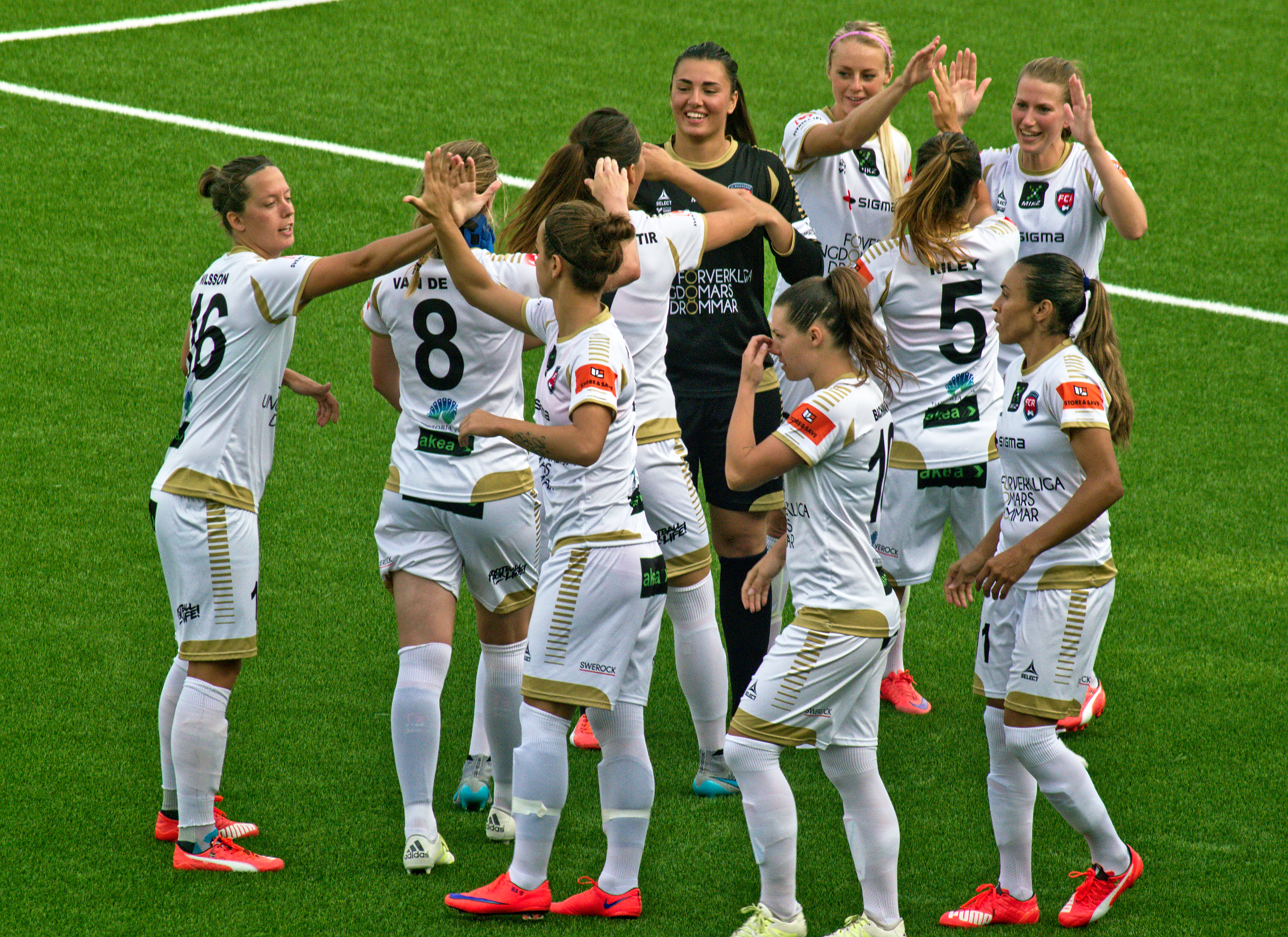 Eskilstuna United - FC Rosengård, Tunavallen i Eskilstuna 5 augusti 2015. Laddning innan match.